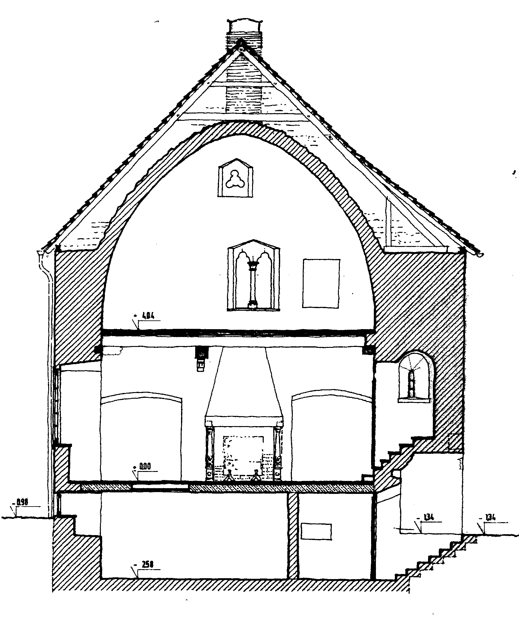 Romanisches Steinwerk osnabrueck schnitt